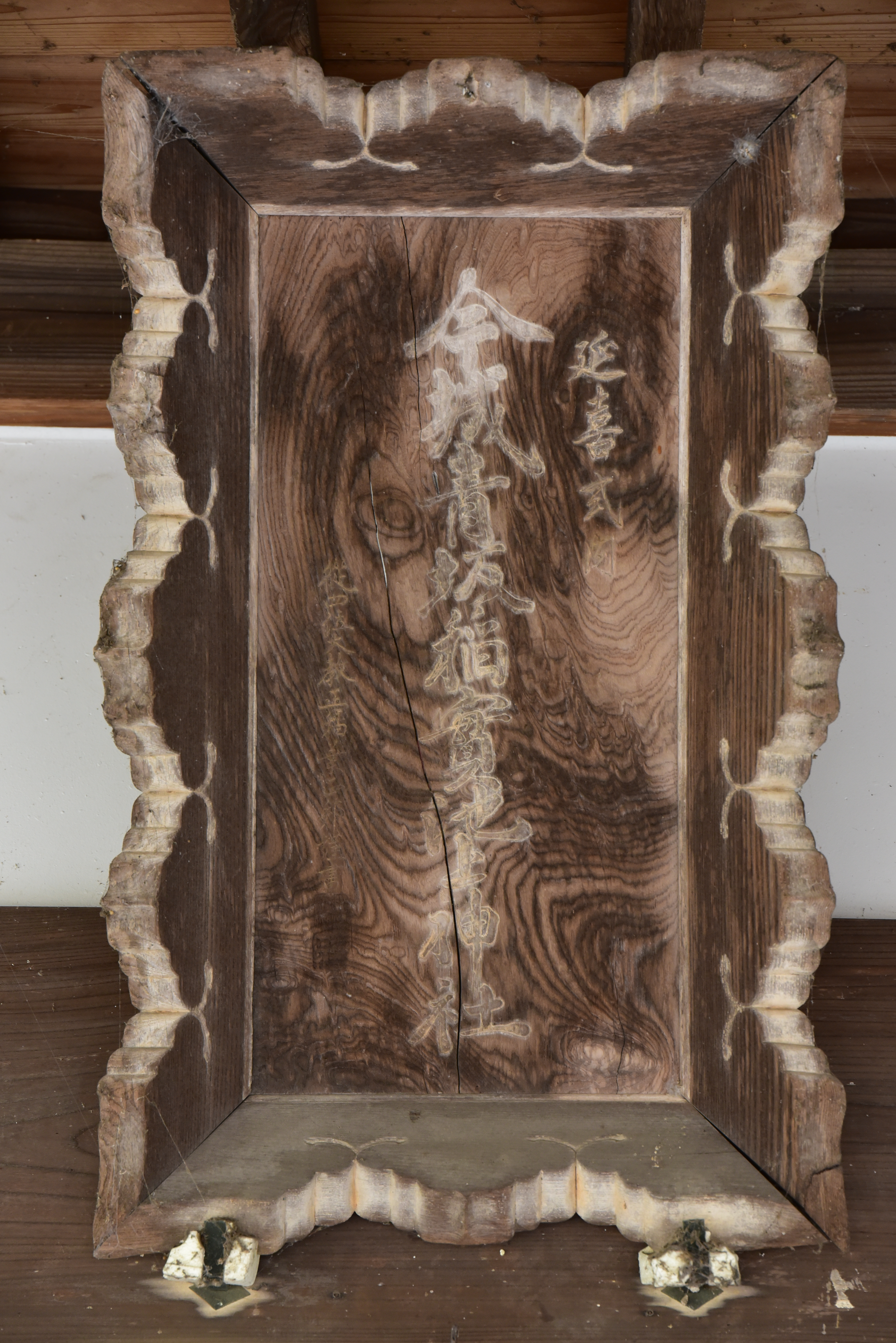 埼玉県上里町 今城青八坂稲実池上神社の拝殿の扁額